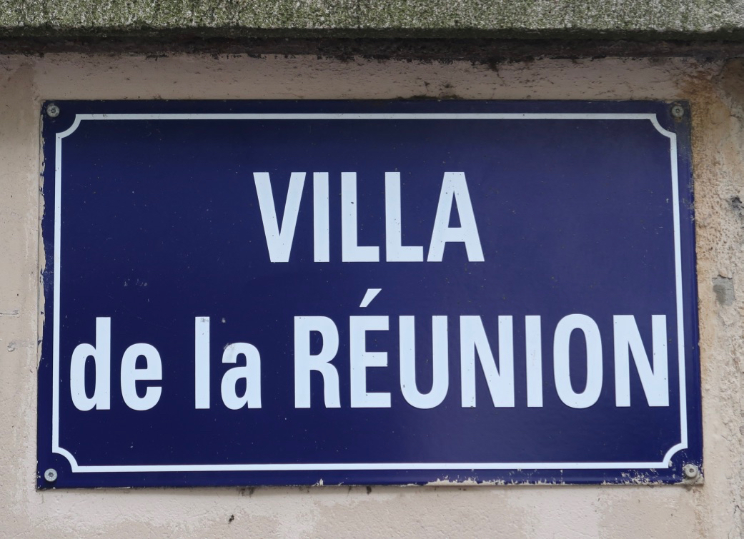 Plaque de la villa de la Réunion (Paris, 16e).